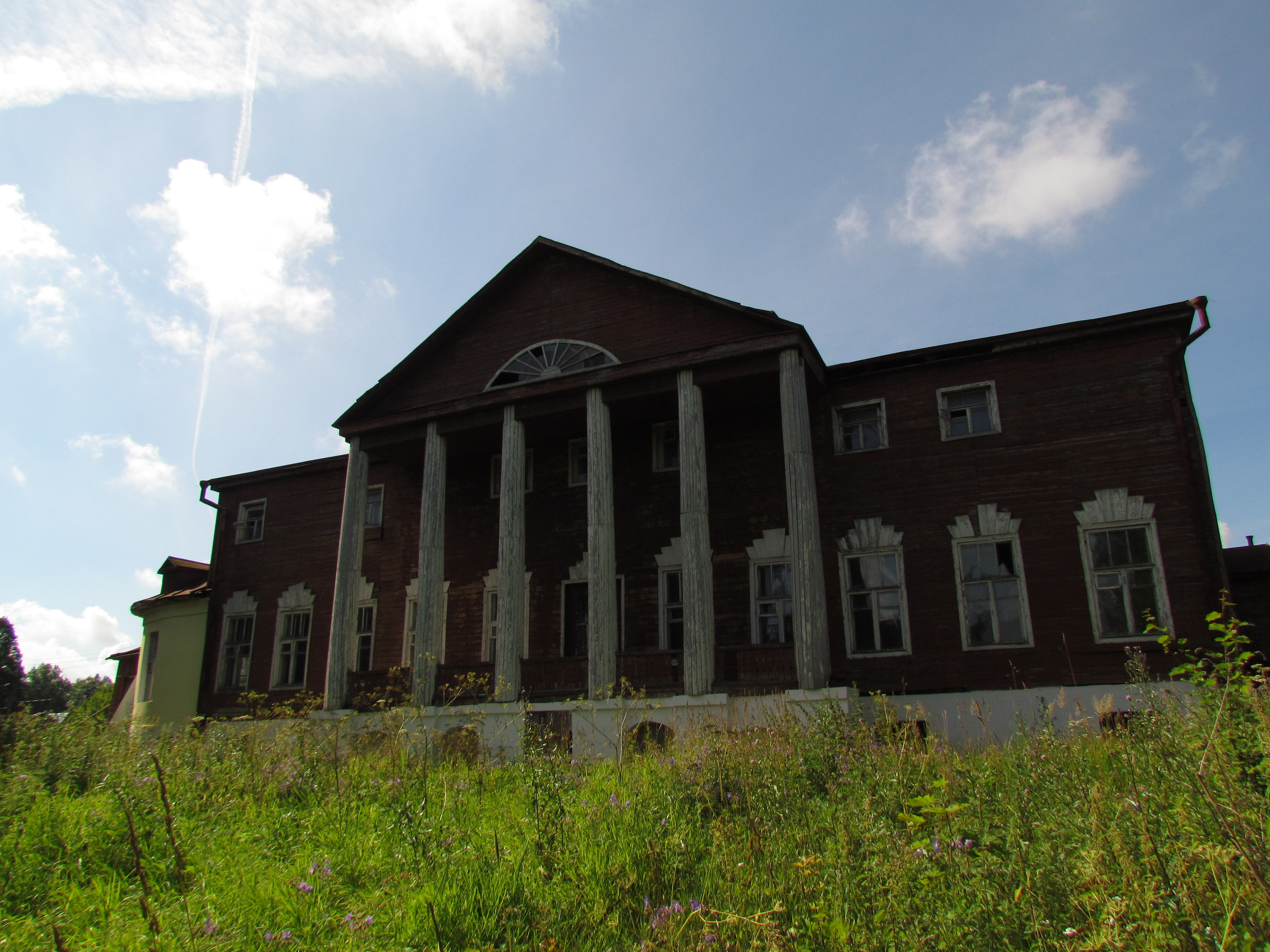 Усадьба кудрявцевых (Калужская область, Малоярославец, село панское)